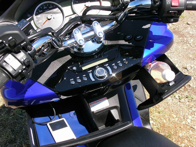 Honda FORZA2